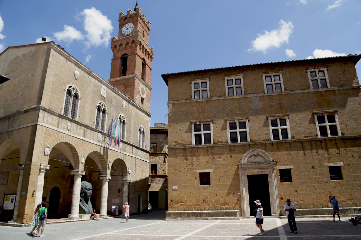 Piazza Pio II: Palazzo Comunale e Palazzo Vescovile, Pienza, Italia.